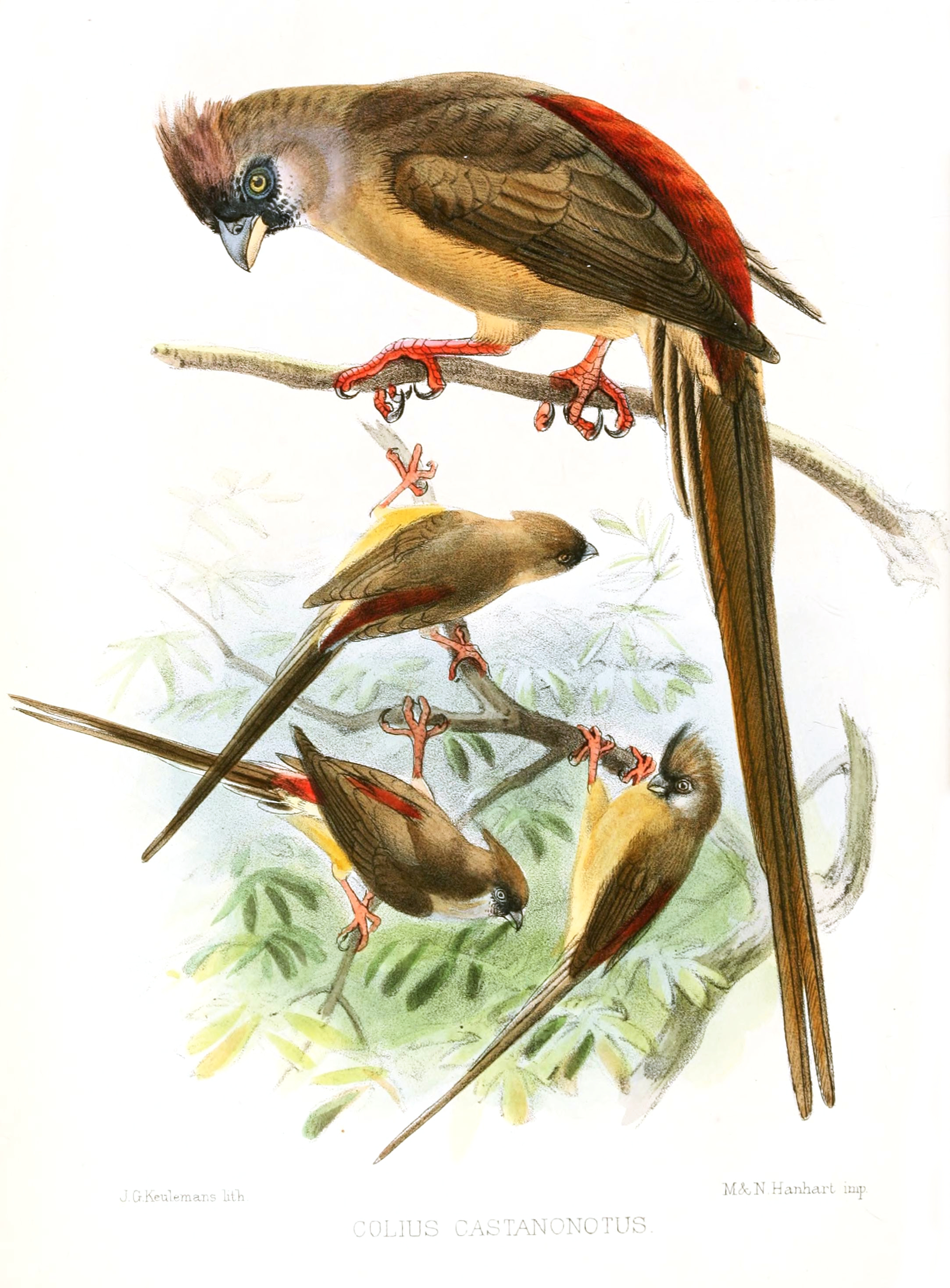 Colius castanonotus